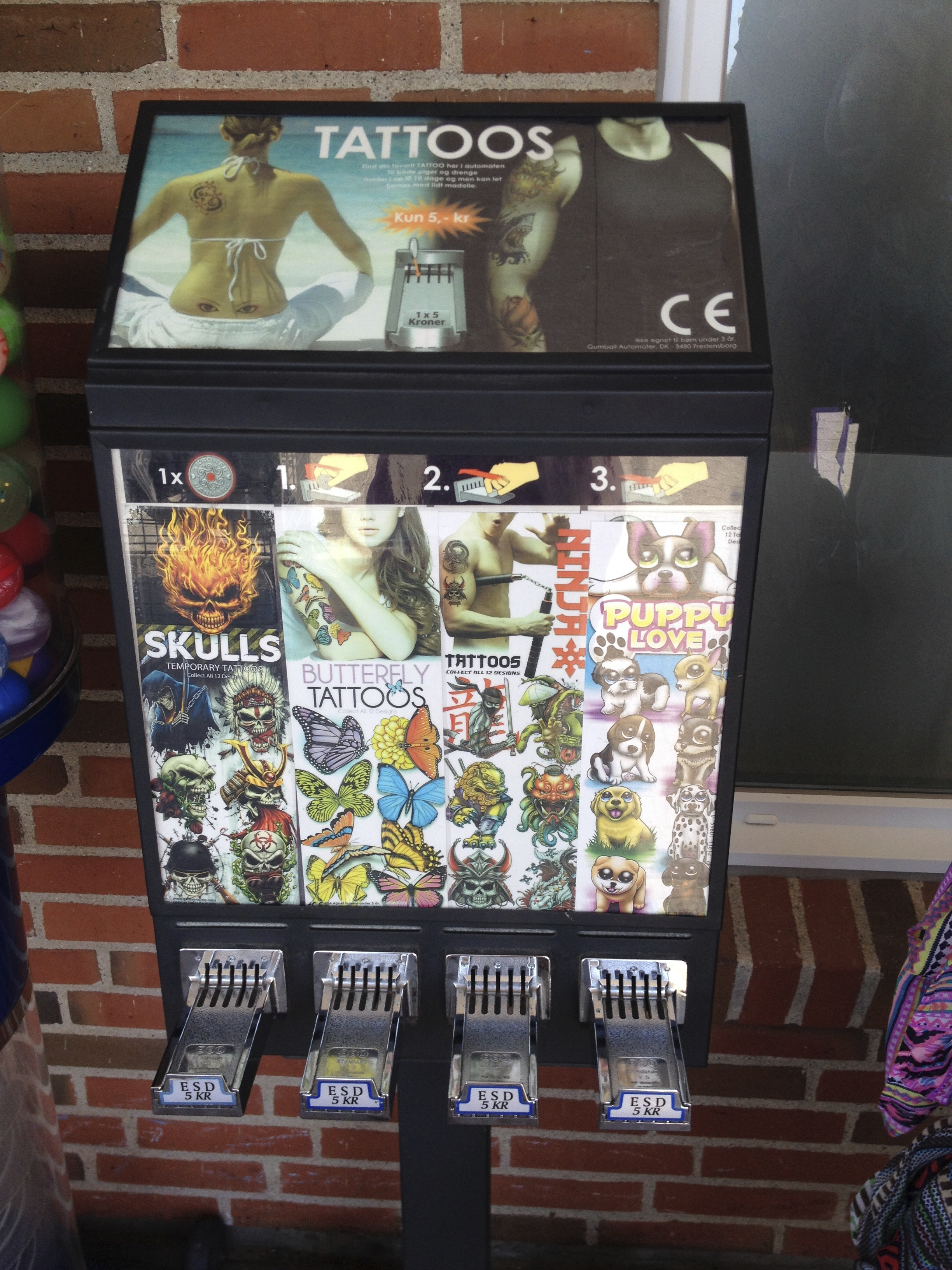 Abziehtattooautomat